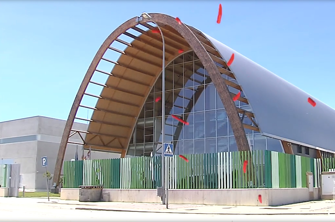 Pilar del Olmo visita Sarrió Papelera, Torraspapel, Resinas Naturales y Norma Doors.